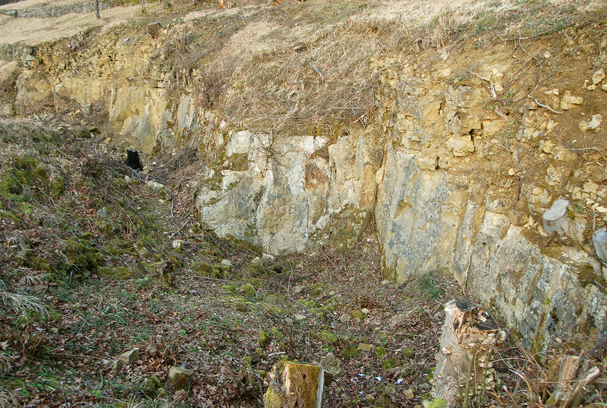 Relikte eines ehemaligen Steinbruchs am Rand des Rotenackers (Gewann Oberer Wannenberg): Lettenkeupersandstein mit verwitterter Deckschicht